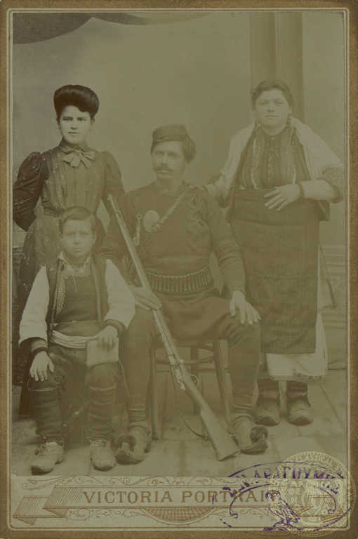 Гръцката андартска четничка Теодора Стефанова от Орехово, Битолско в народна носия; Мария Ст. Морайту, брат й Николаос Ст., четник на Николаос Цолакис заедно с двамата си братя Михаил и Теодорос